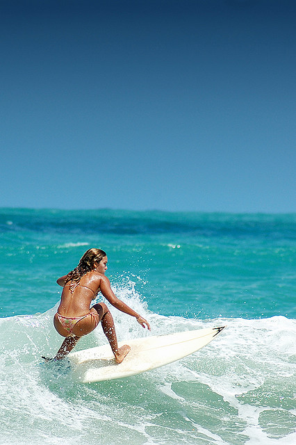 Fêssorinha....Fêssorinha.... (A) To Vendendo uma F50 + Lente 35-80 4-5.6...alguém quer!!?